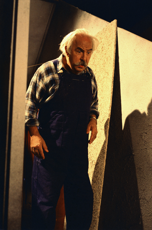 Lex Goudsmit in Citroentje met suiker tijdens de opnames van aflevering Eiliemakers.